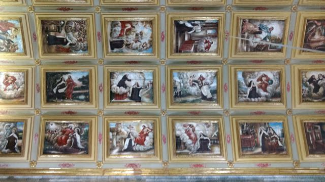 Fotografia colorida das pinturas do teto da Igreja de Santa Teresa D'Ávila, Recife, Brasil.